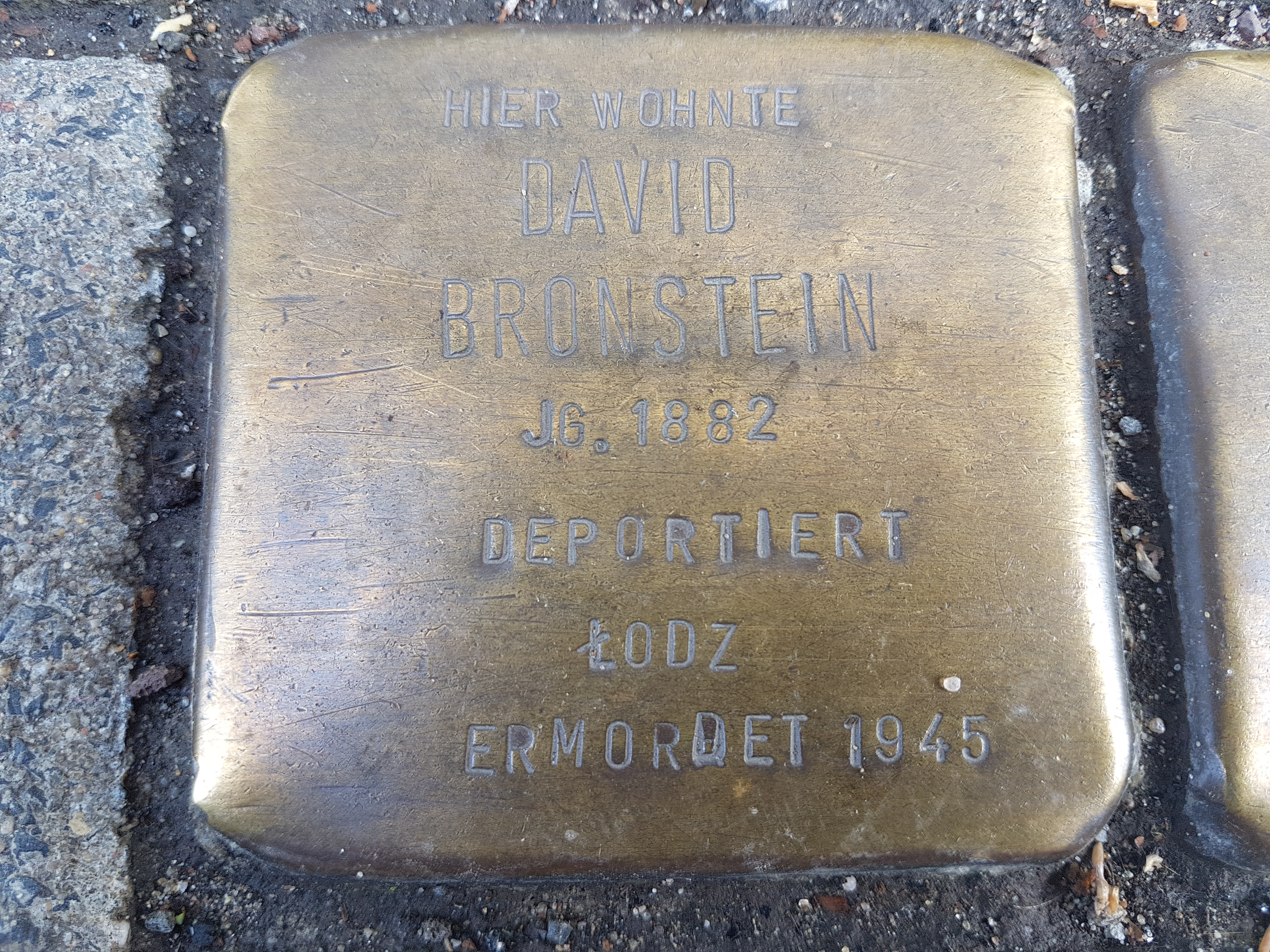 Stolperstein Duisburg David Bronstein